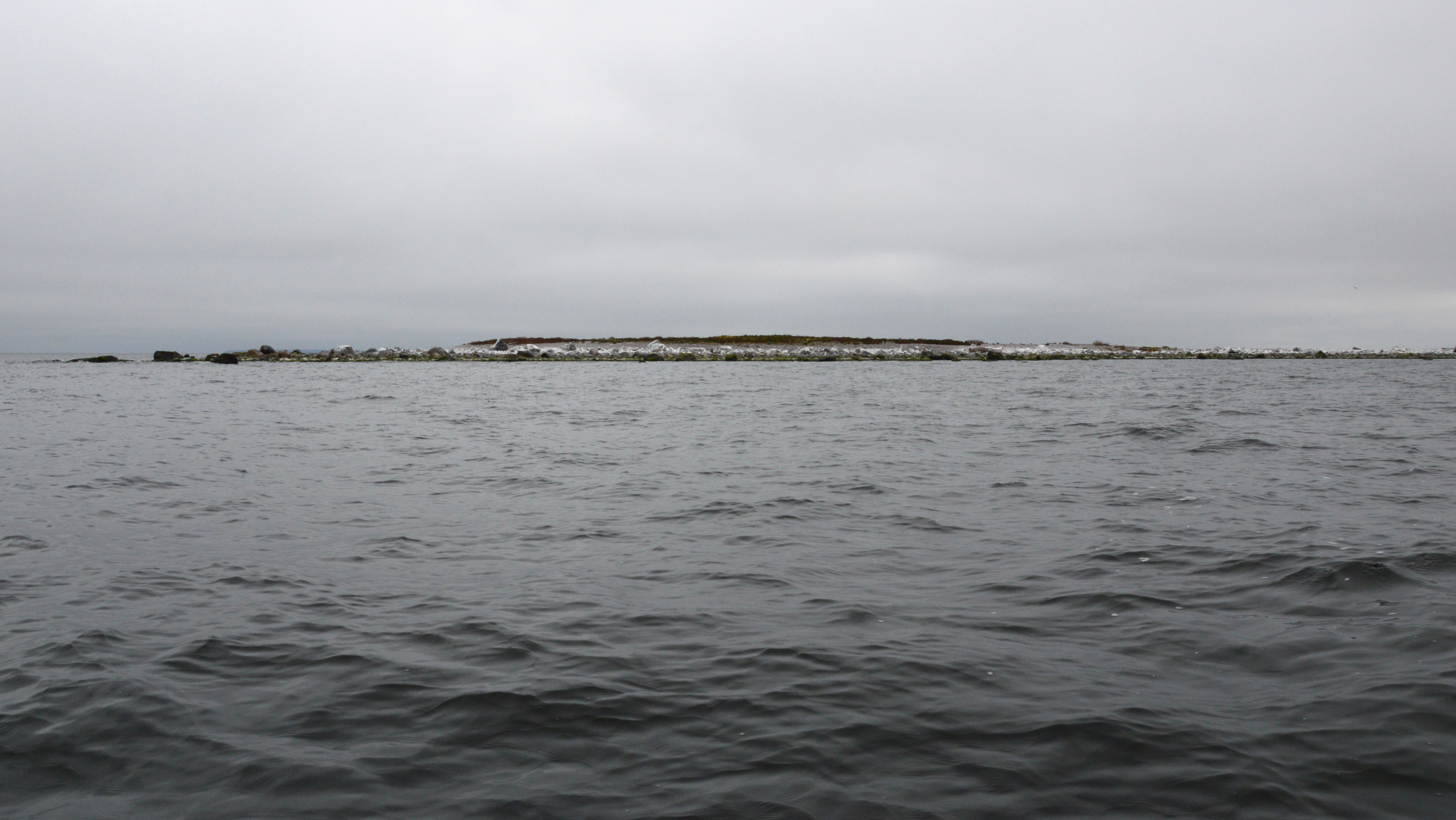 Põhja-Malusi saar.